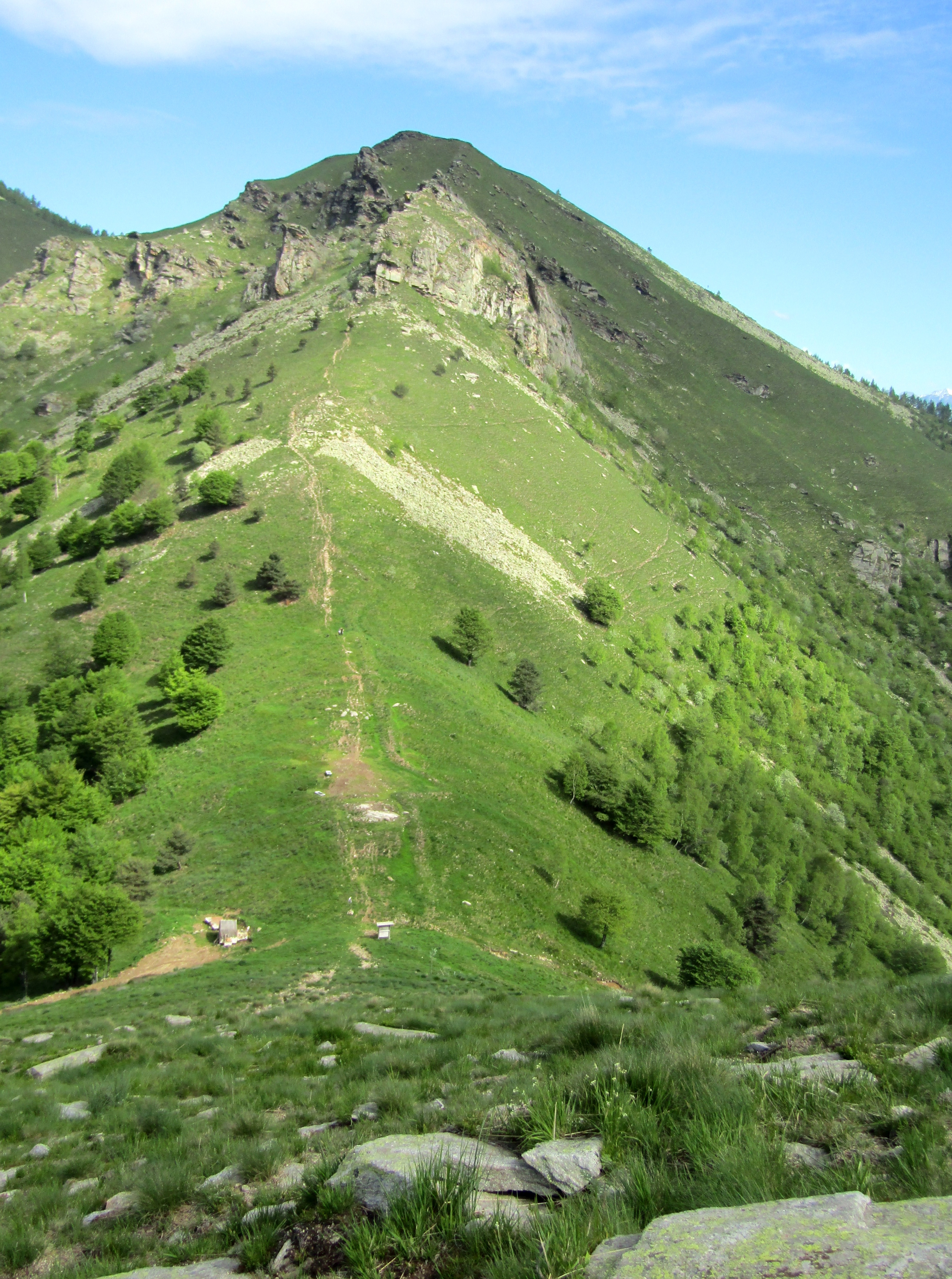 Colle del Besso (Alpi Cozie): vista dalle pendici del Monte Cristetto, sullo sfondo il Monte Paletto